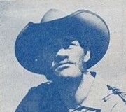 Bill Parks dans un magazine de catch du 8 mai 1953